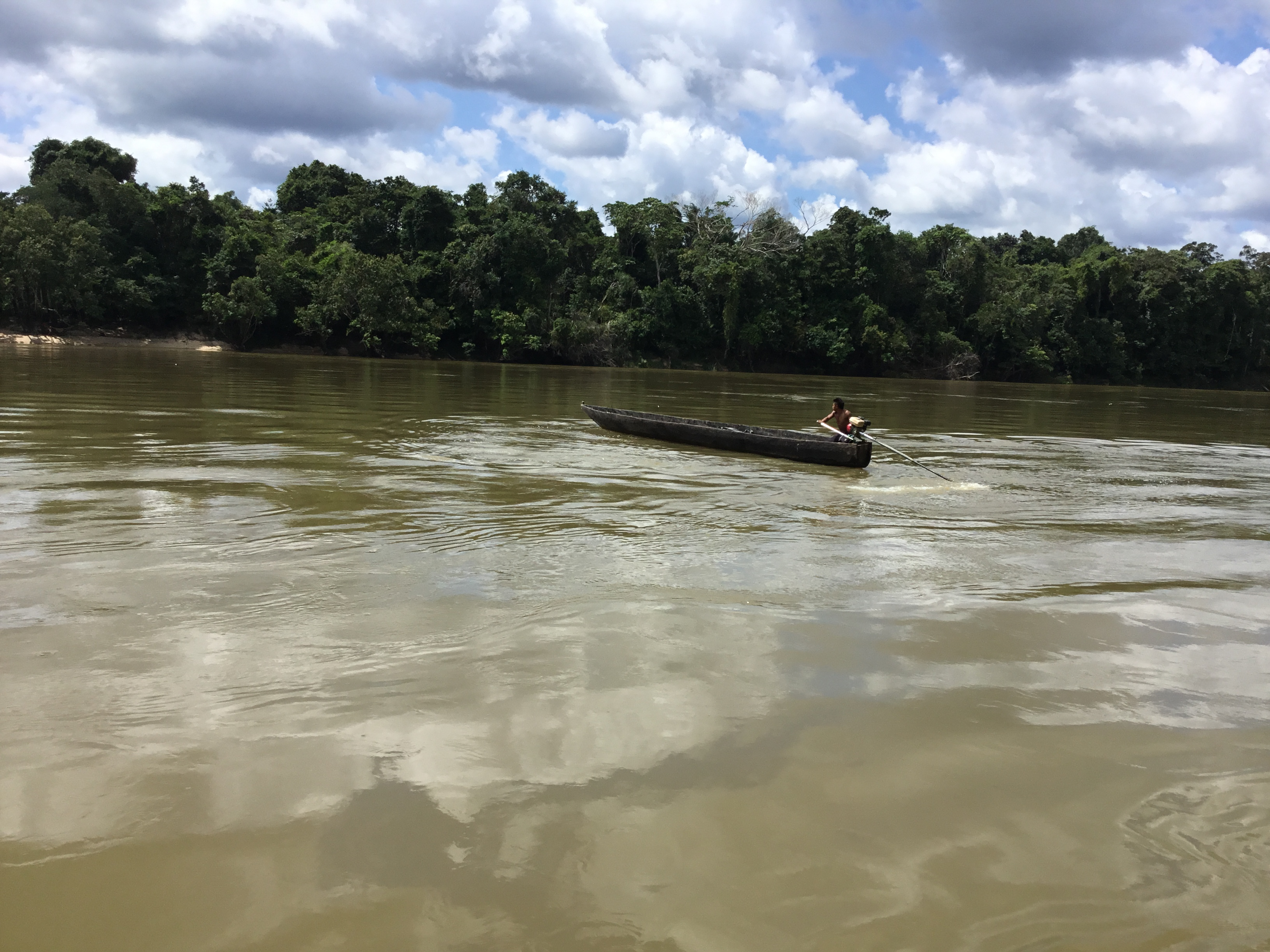 Esta fotografía fue tomada en un área protegida de Colombia con el código 52 del RUNAP.